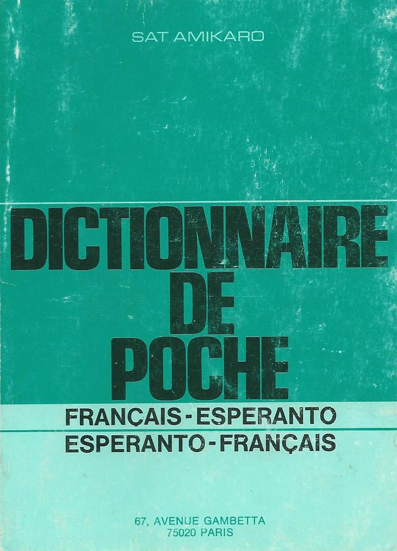 livre "Dictionnaire de Poche Français-Esperanto, Esperanto-Français", 1980